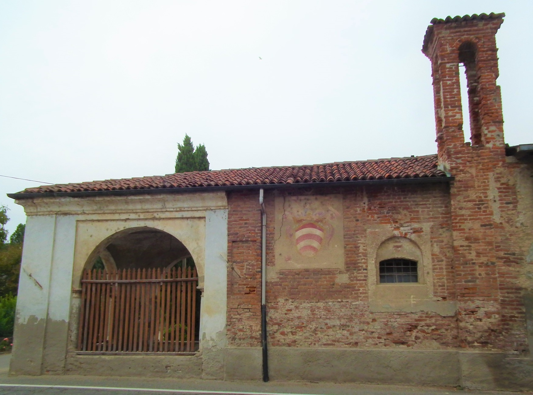 Vista laterale della Chiesa di Sant'Antonio nel comune di Mandello Vitta. Visibili il porticato d'ingresso, il campanile e lo stemma della famiglia Caccia.